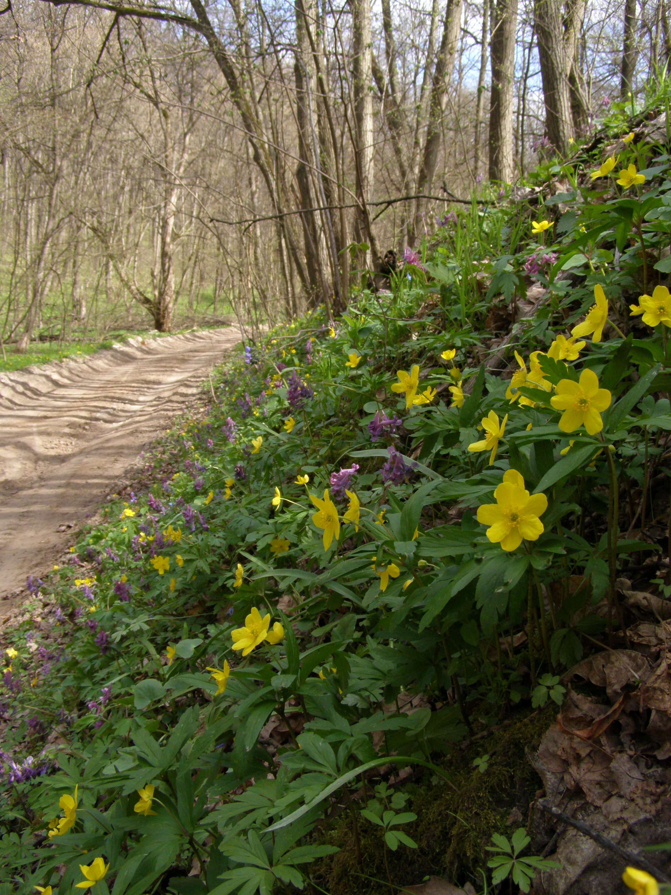 «Гомільшанська лісова дача», Зміївський район Гомільшанське лісництво, кв.кв. 1-125; Задонецьке лісництво, кв.кв. 173–207, 215; Таранівське лісництво, кв.кв. 105–115